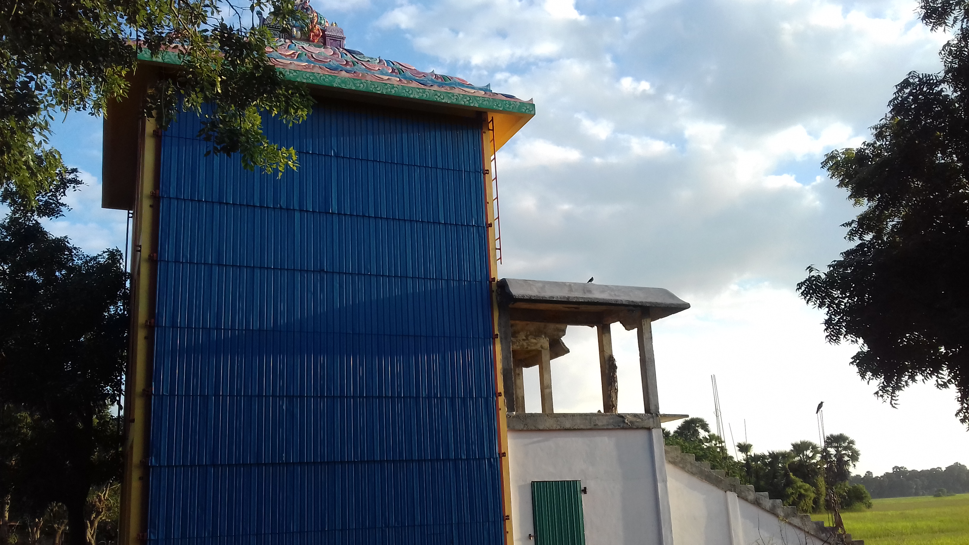 அராலி ஸ்ரீ விசாலாக்ஷி சமேத விஸ்வநாதேஸ்வரர் தேவஸ்தானம்